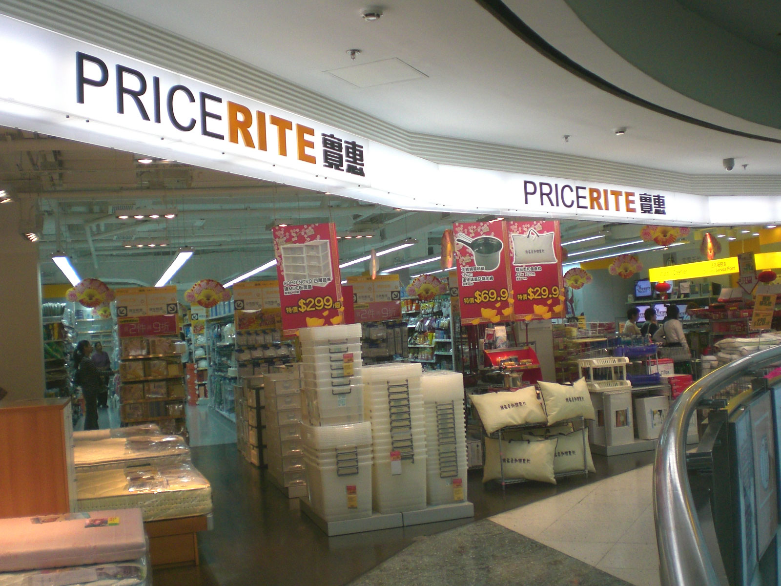 西九龍中心實惠家居廣場, Dragon Centre, Sham Shui Po, Kowloon, Hong Kong.